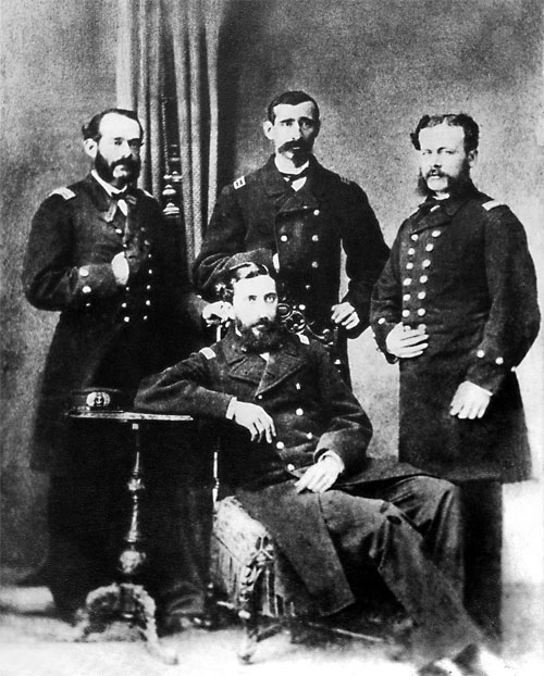 Los Cuatro Ases de la Marina del Perú: Miguel Grau, Lizardo Montero, Aurelio García y García (de izq. a der.), Manuel Ferreyros (sent.)